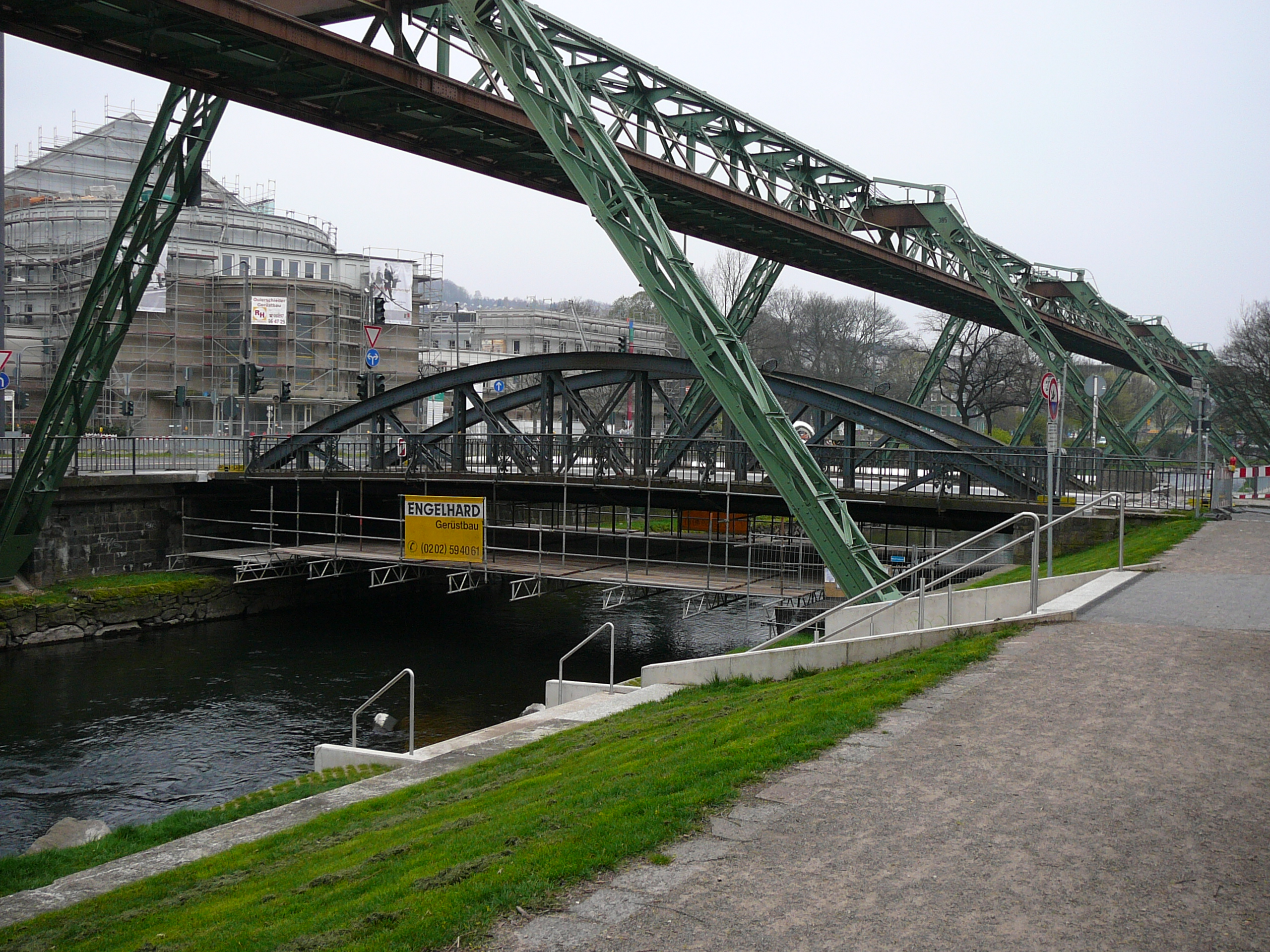 Dörner Brücke